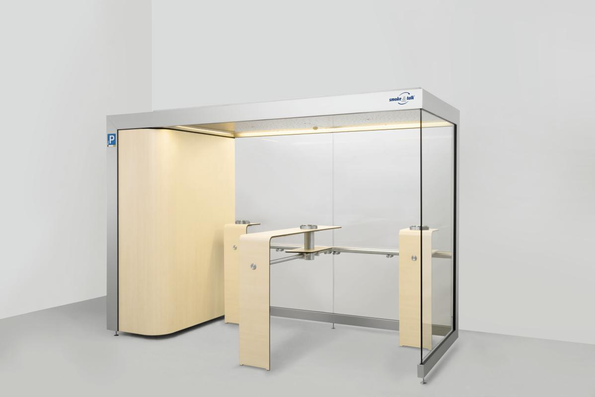 Eine zertifizierte Raucherkabine nach IFA für 8 Personen